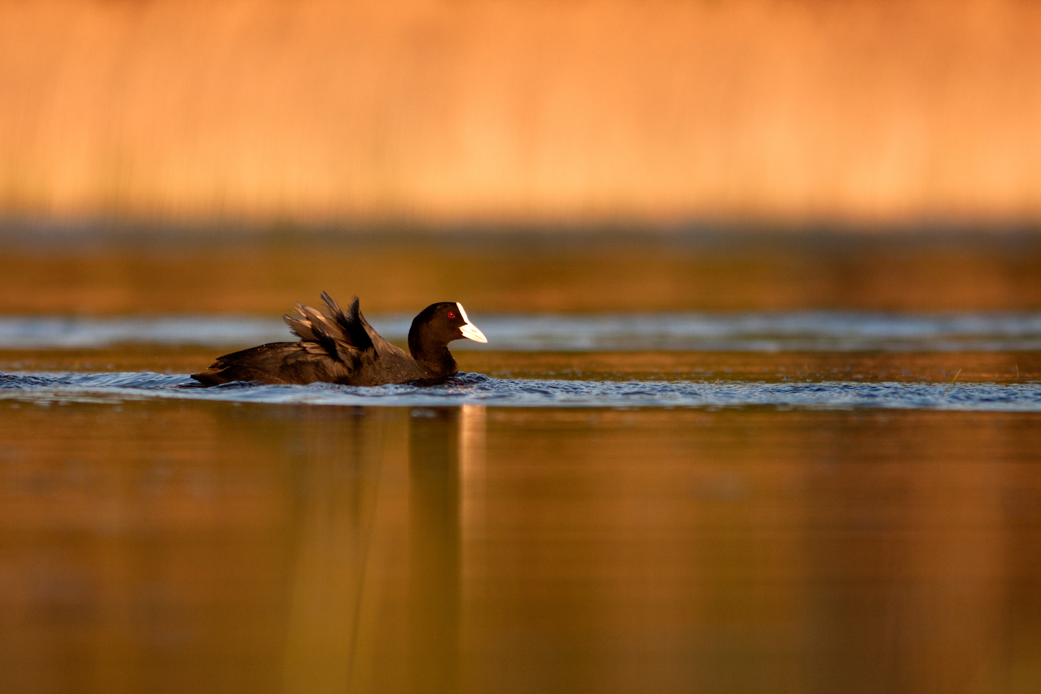 Lauk otsis Paunküla veehoidlas kuldses õhtuvalguses kaaslast.